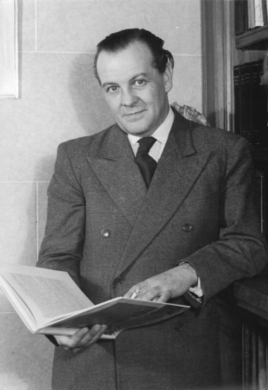 Zentralbild Gielow 12.1.1953 Prof. Richard Paulick-Leiter der Meisterwerkstatt III der Deutschen Bauakademie, Nationalpreisträger 1952 und Goethepreisträger 1952.